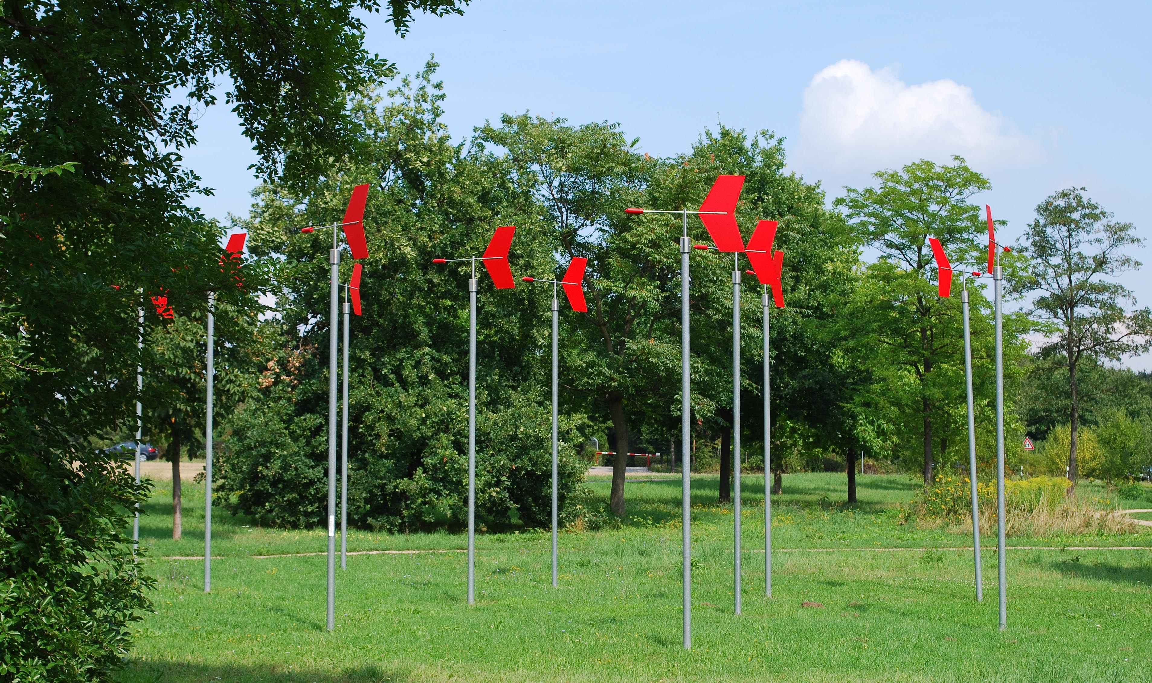 Wetterpark Offenbach - Station Wind